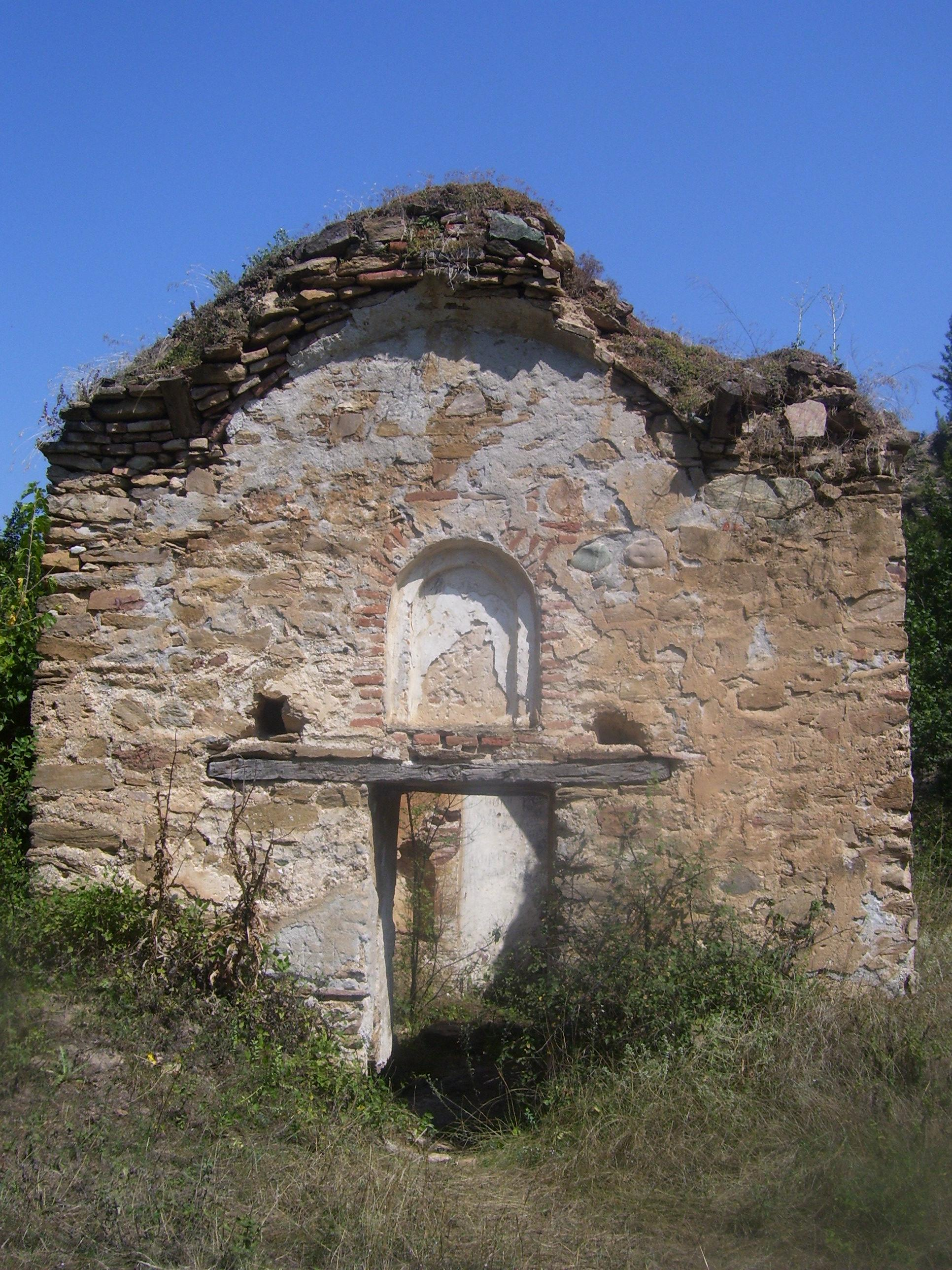 Църквата „Свети Атанасий“ в село Ръждавица, Кюстендилско.